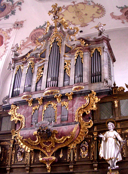 Klosterlechfeld, Germany: Wallfahrtskirche Maria Hilf, Orgel